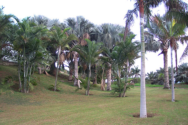 Sección de Madagascar dentro del Palmetum de Santa Cruz de Tenerife (Tenerife, España).